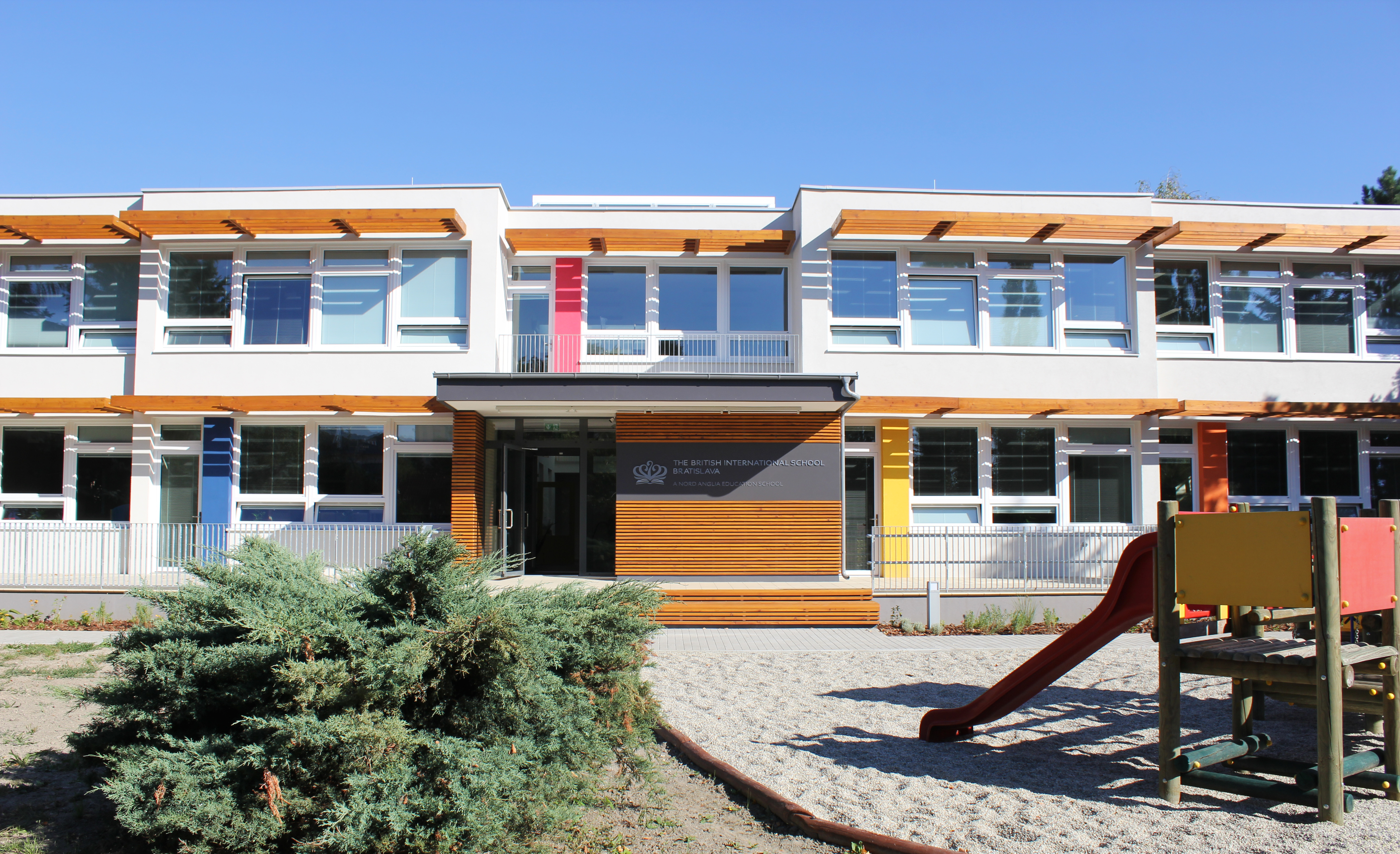 Britská medzinárodná škola Bratislava (BISB), ktorá bola založená v roku 1997, patrí medzi najdlhšie pôsobiace medzinárodné školy na Slovensku. Škola sídli v Dúbravke a v súčastnosti vzdeláva viac ako 770 študentov vo veku od 2 do 18 rokov na predškolskej, základnej a strednej úrovni z viac ako 40 krajín. Vychádza z učebných osnov, ktoré sú založené na anglických národných učebných osnovách, medzinárodnom programe pre stredné školy (IGCSE) a medzinárodnom maturitnum programe International Baccalaureate Diploma Program (IBDP).